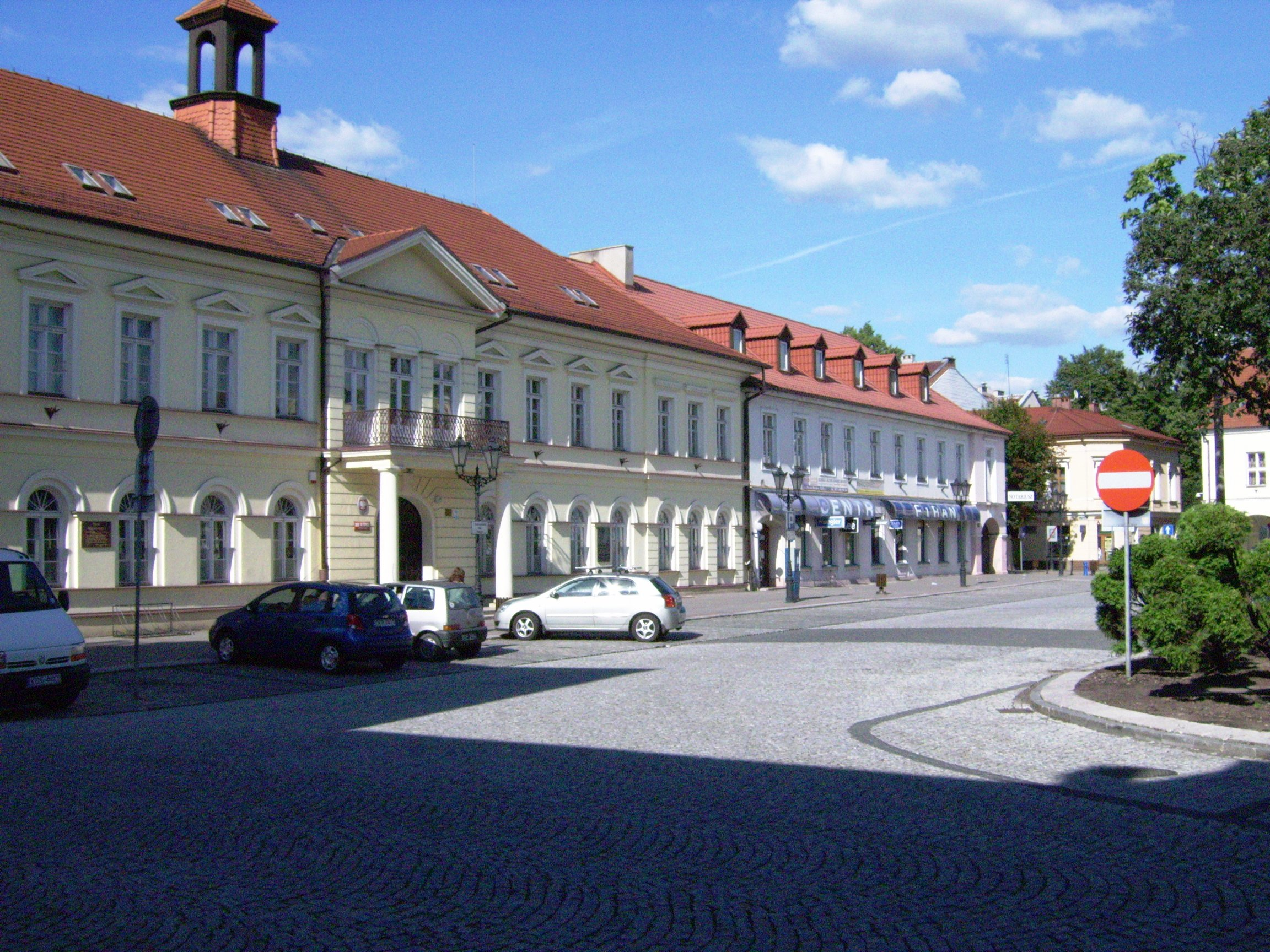 Oświęcim, Rynek Główny 14 - Kamienica Ślebarskich, obecnie Sąd Rejonowy (zabytek nr A/964/M)